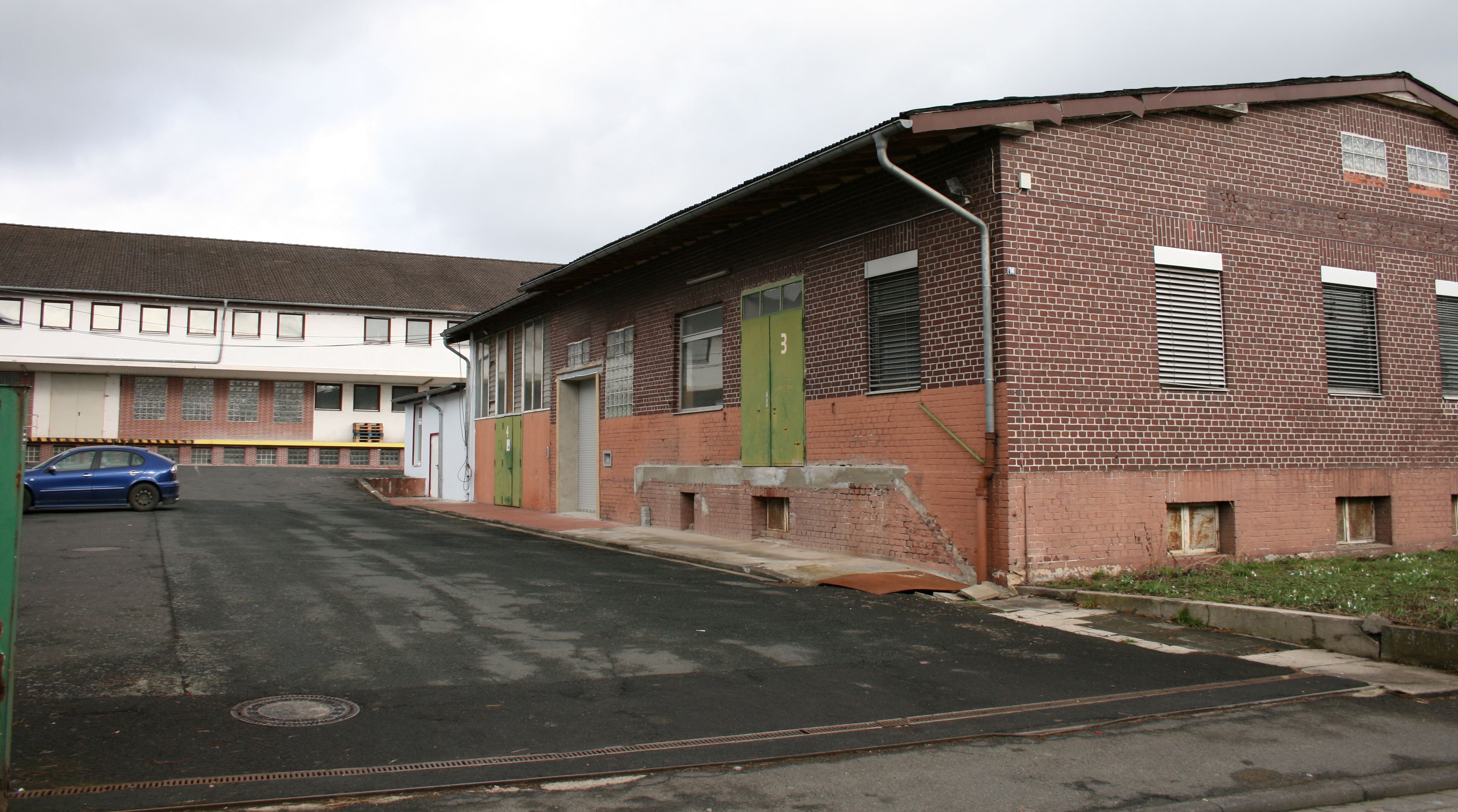 Ehemalige Molkerei in Schupbach, Deutschland